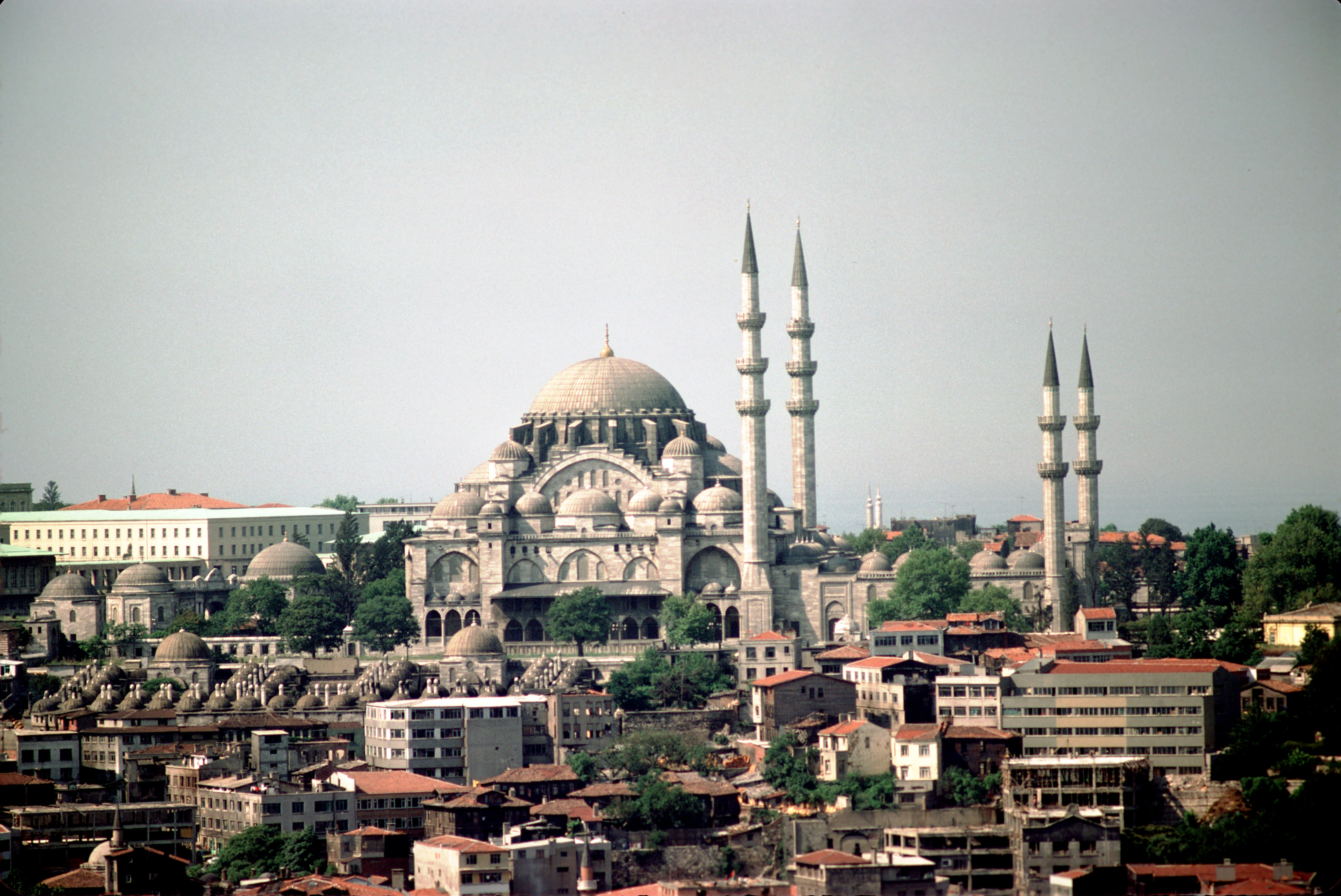 Süleymaniye Camii ou la Mosquée de Soliman le Magnifique photographiée depuis la tour de Galata. Istanbul, Turquie.